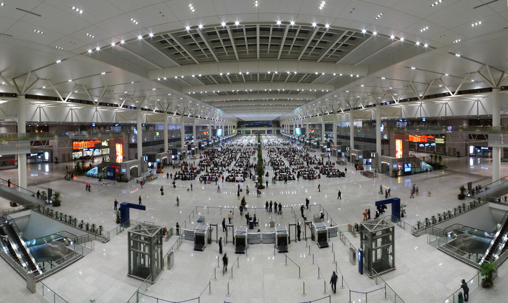 Panorama of Shanghai Hongqiao Railway Station 上海虹橋站